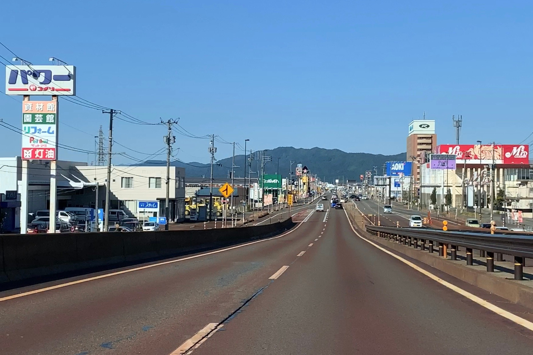 国道7号新新バイパス終点付近から新発田バイパスを望む（新発田市舟入，2020年5月）